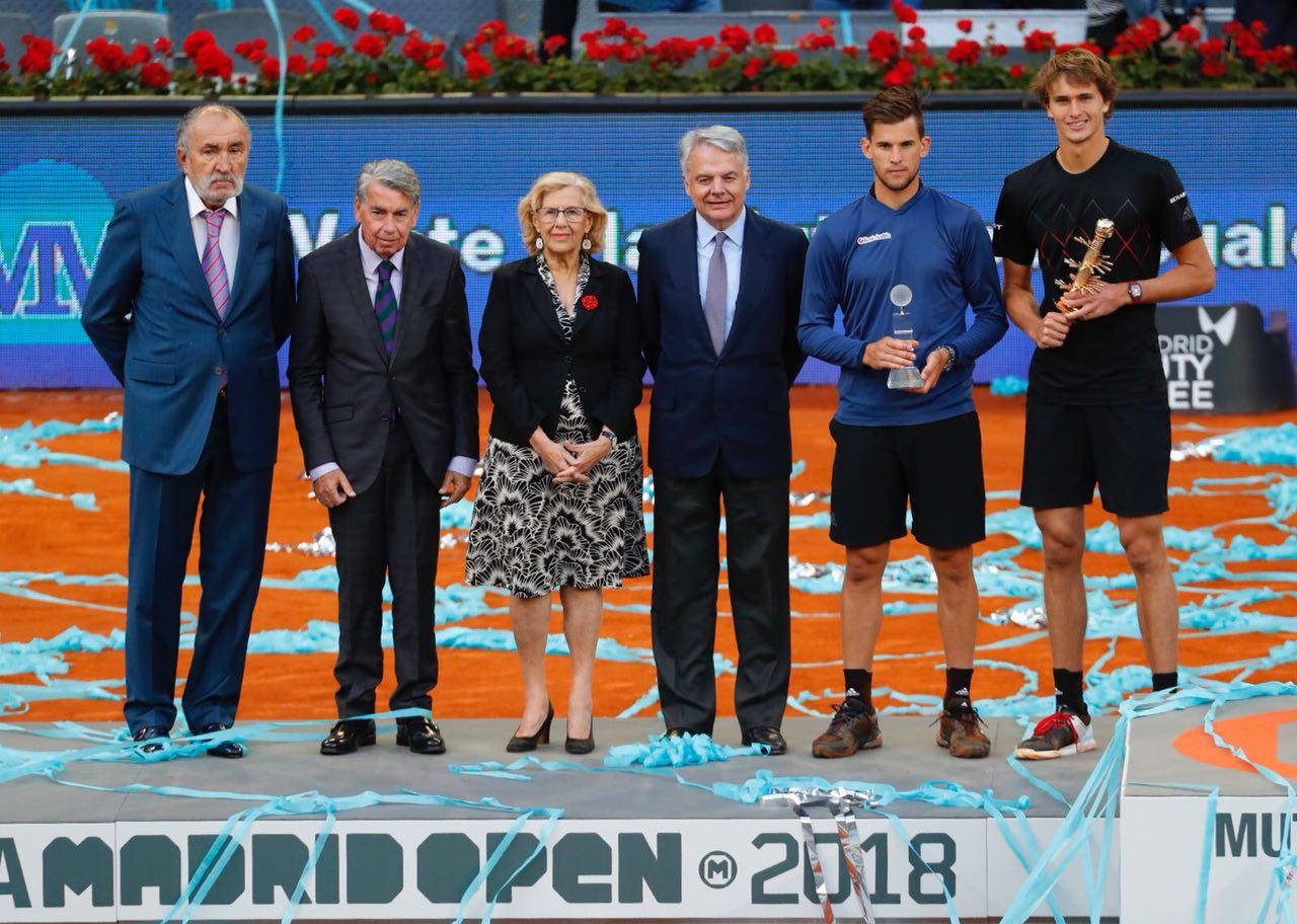 La alcaldesa de Madrid, Manuela Carmena, ha entregado esta tarde en la Caja Mágica el trofeo del Mutua Madrid Open al subcampeón del torneo de este año, Dominic Thiem, que ha sido derrotado por Alexander Zverev, tras una gran final. El tenista alemán ha conseguido derrotar a su rival austriaco en una hora y 18 minutos de partido. Por su parte, el empresario y ex tenista Ion Tiriac ha hecho entrega del trofeo al tenista ganador, Alexander Zverev.